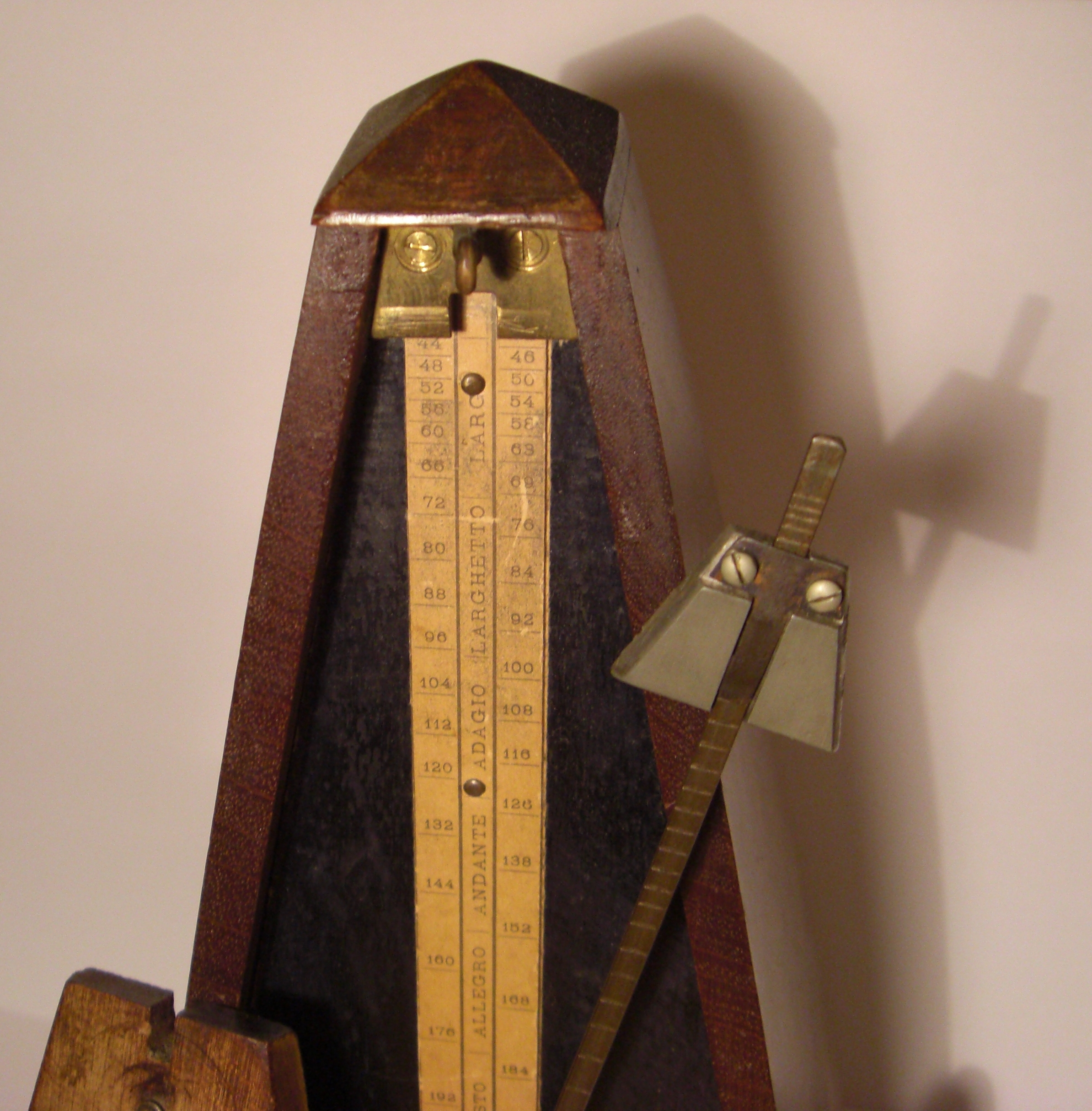 Metronome Maëlzel